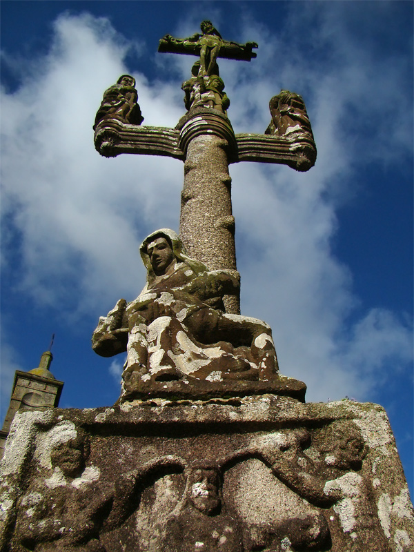 Enclos paroissial, Saint-Servais, Finistère, Bretagne, France. Le calvaire.